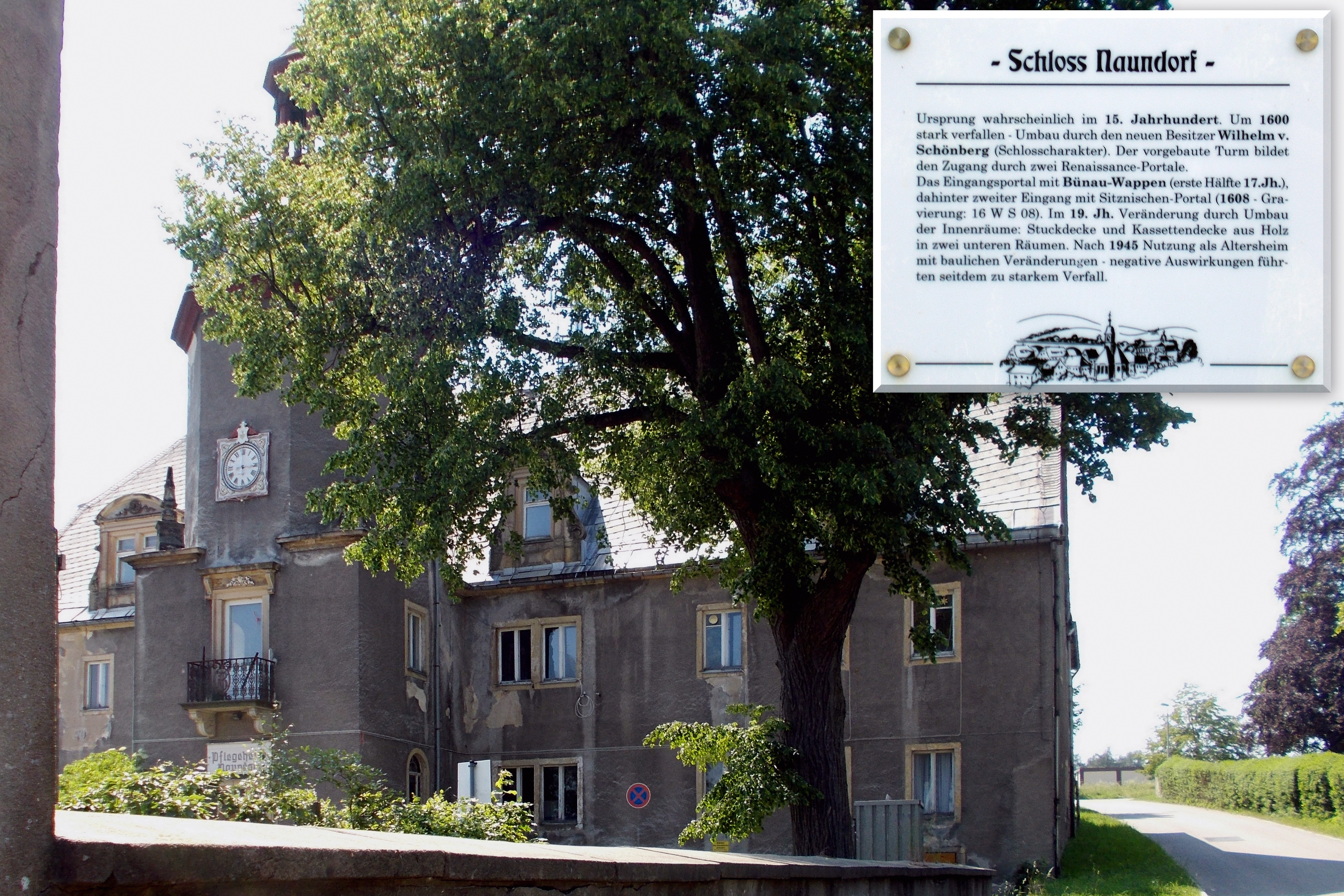 Schloss Naundorf bei Schmiedeberg - leerstehend und verfallend